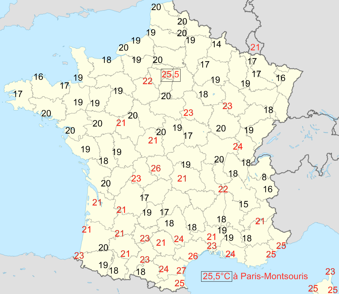 Température minimale le 12 août 2003 (le plus chaud de l'année) en France.